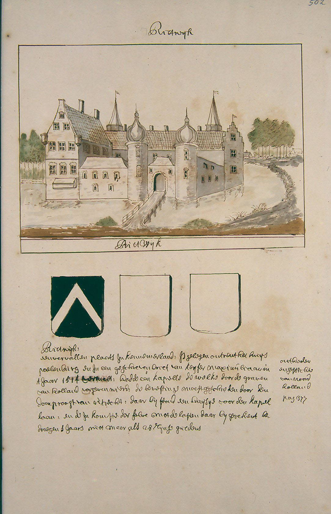 Beschrijving en Afbeelding der Steden, Dorpen, Gehugten Adelijke en andere Gebouwen in Westfriesland, Waterland, Kennermerland, en Aankleve van Dien, Dus beschreven en bij een Versamelt, Mitsgaders, in Alphabetise Ordre Geschikt door Andries Schoemaker